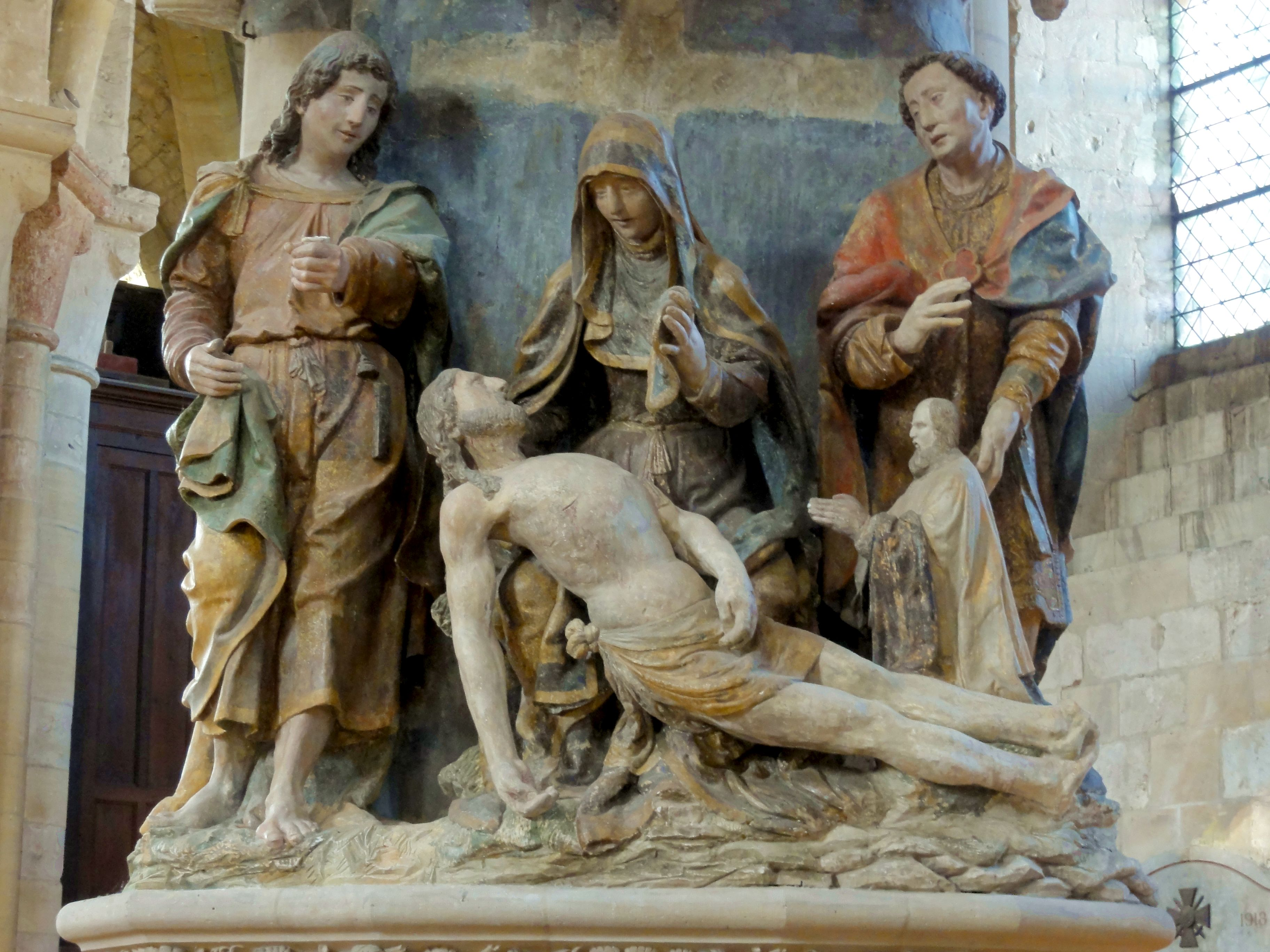 Pietà dans la nef.